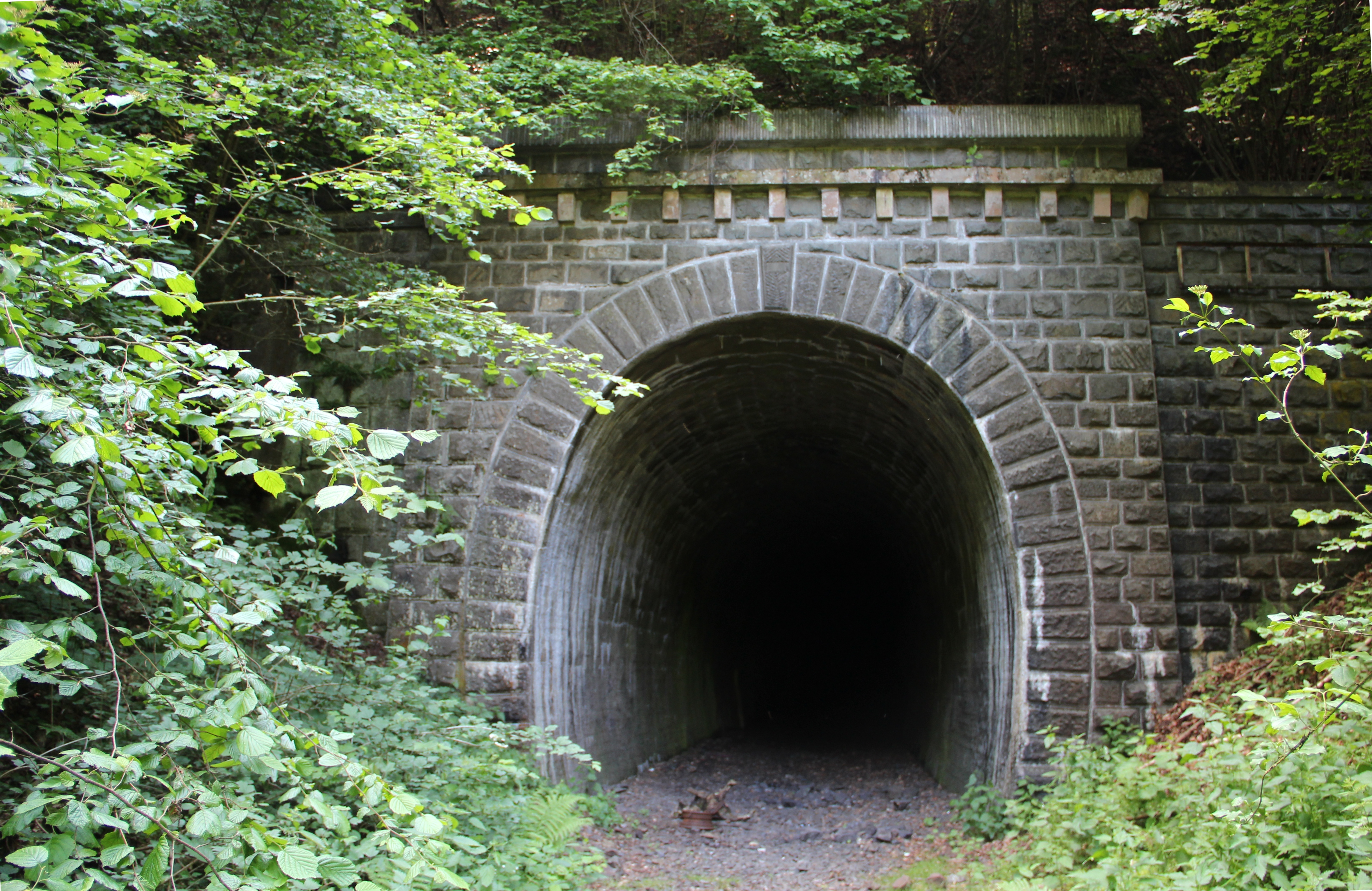 Hartenrod